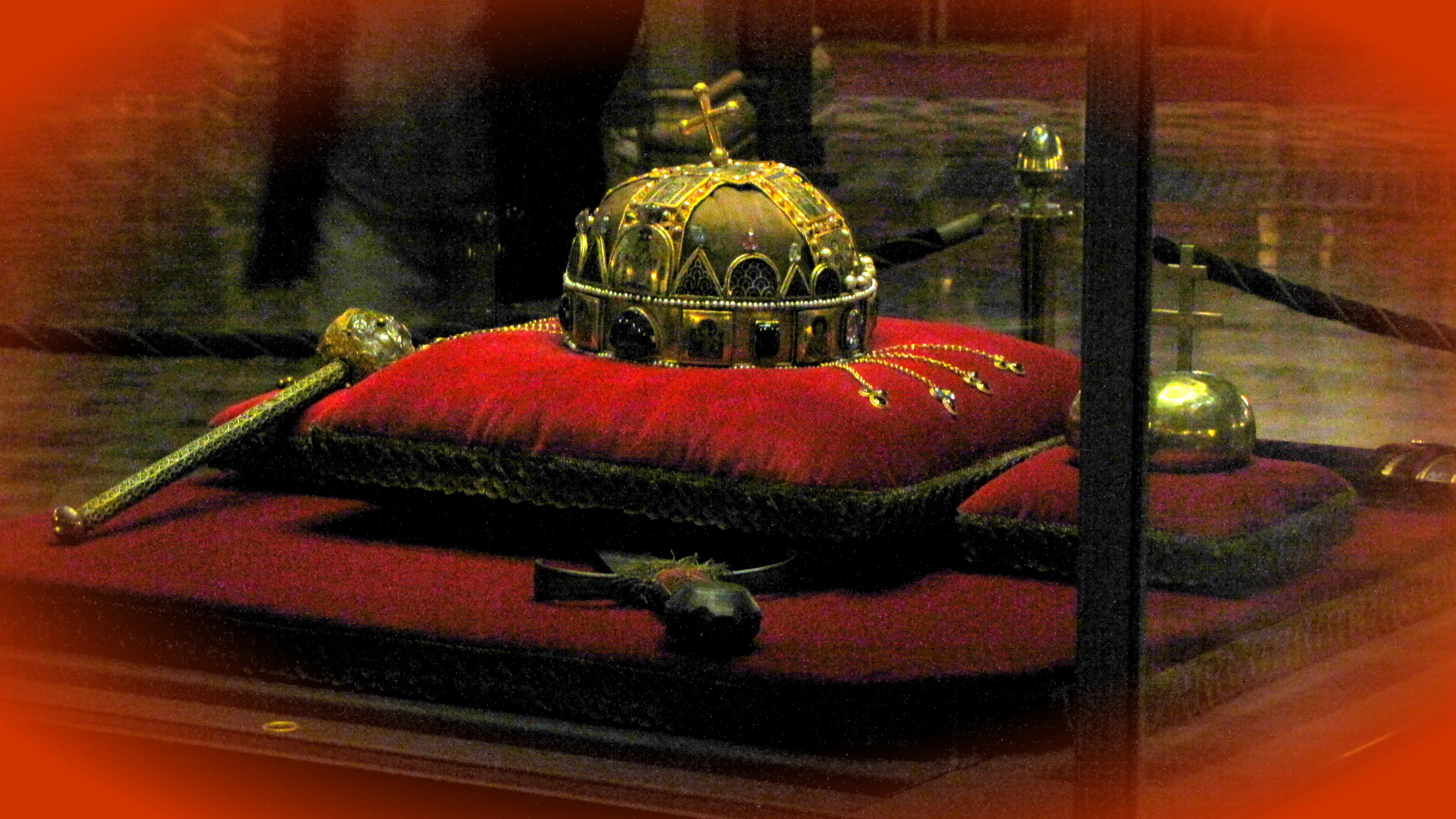 A Szent Korona, mint a magyar államiság egyik jelképe